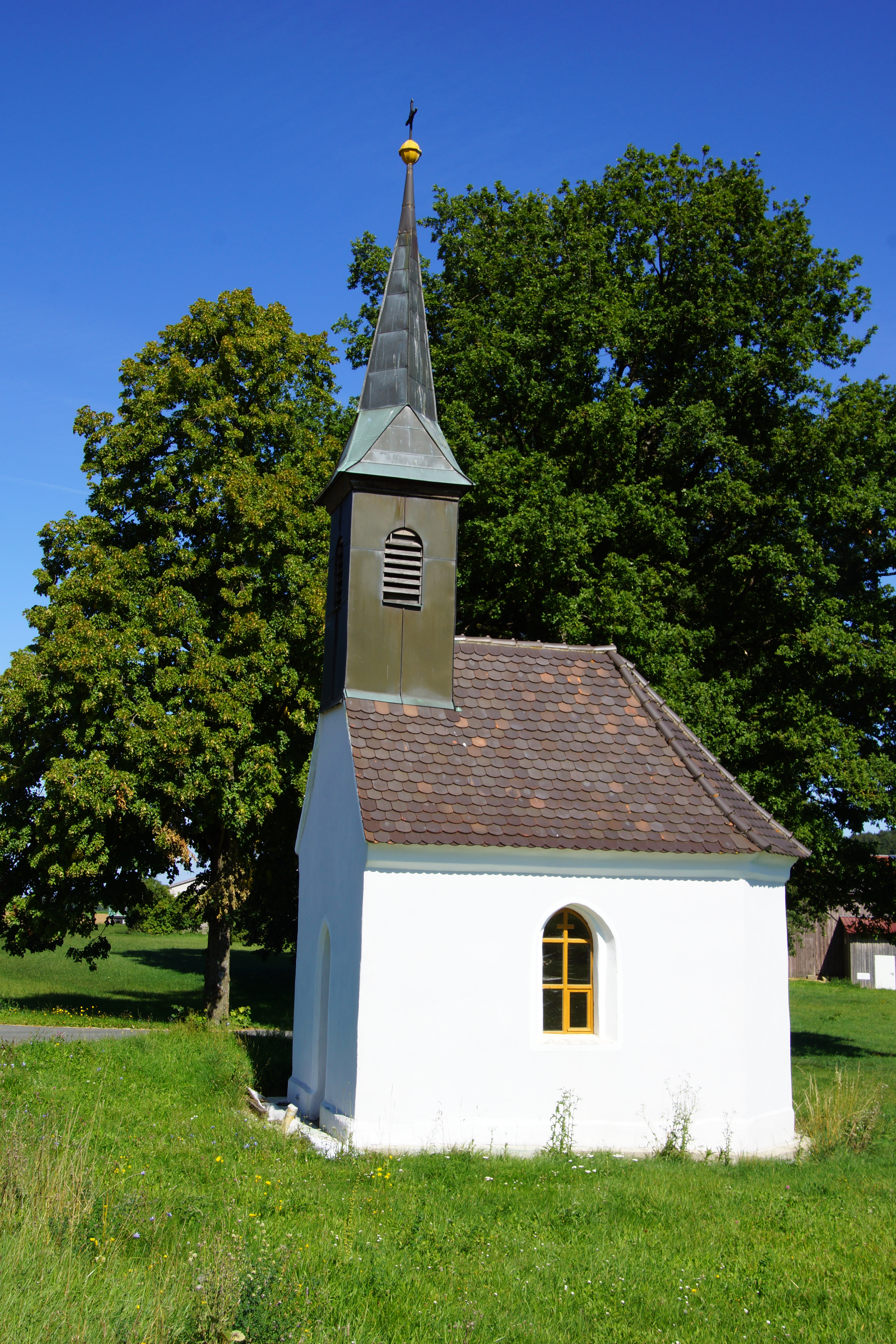 Die Marienkapelle in Sommertshof bei Velburg